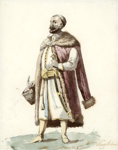 Беларуская (тарашкевіца): Кашталян (Kaštalan) Вялікага Княства Літоўскага